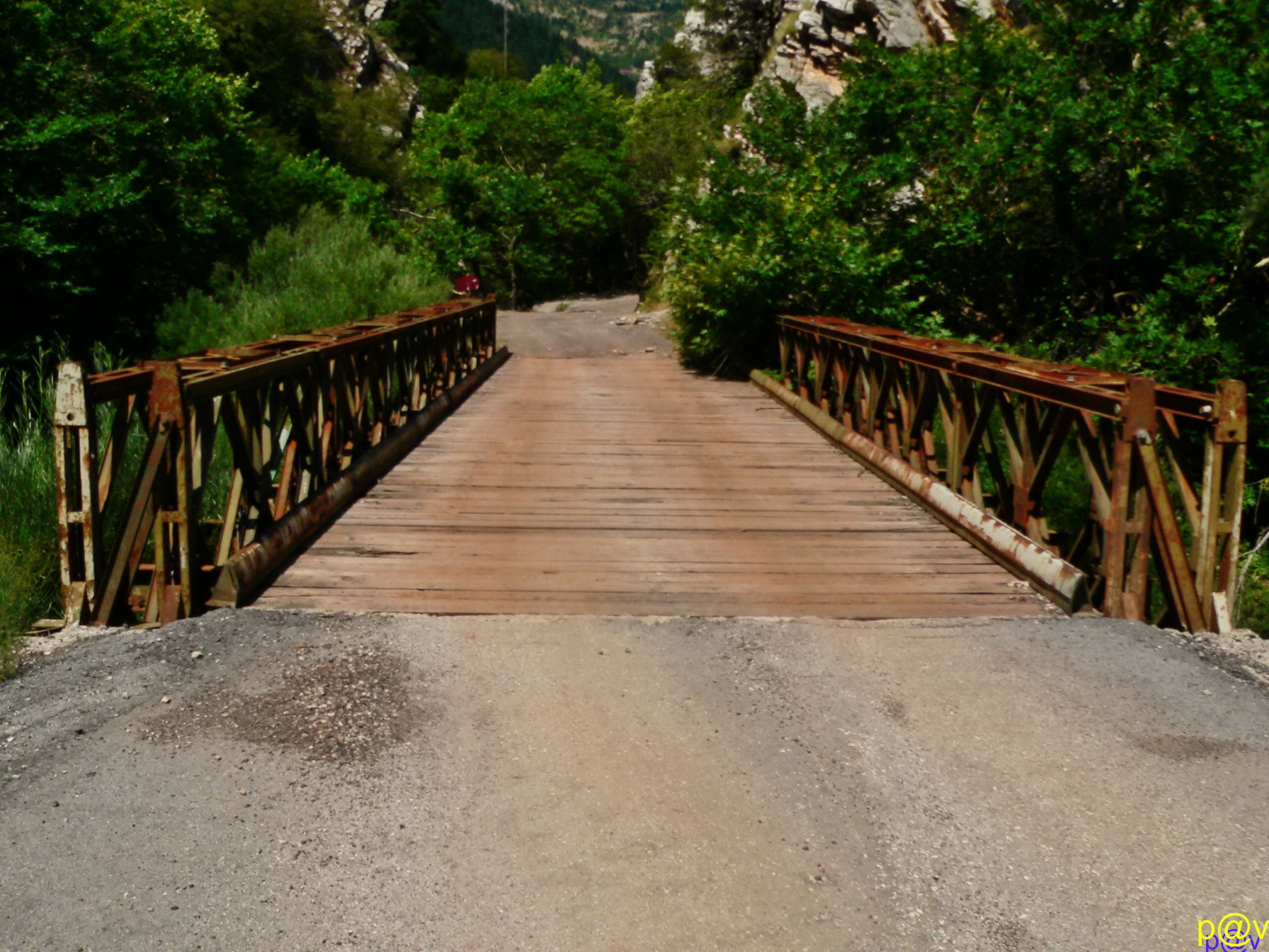 Στρατιωτικη; γεφυρα